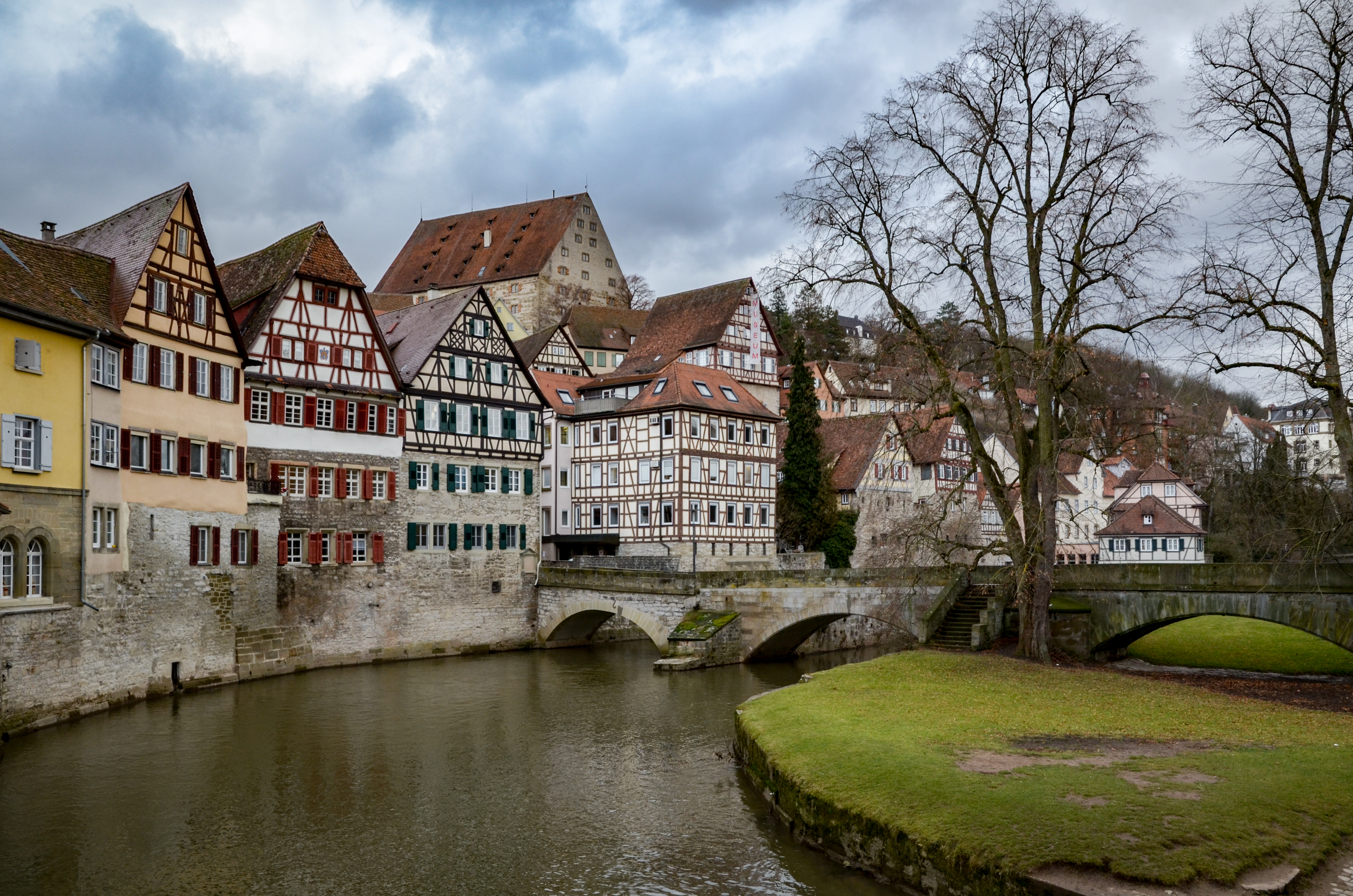 Schwäbisch Hall, Steinerner Steg 8, 7, 6, 5